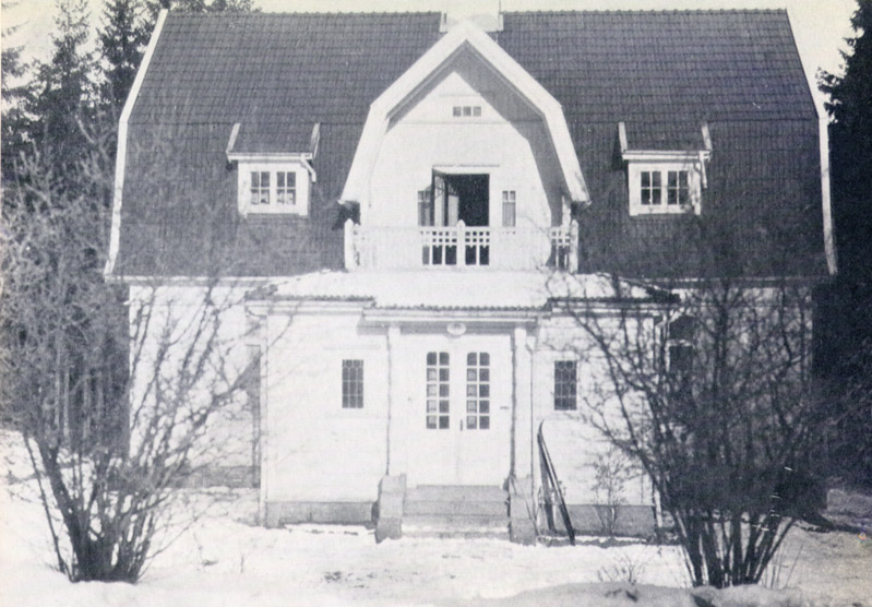 Kurt Tucholskys Villa in Hindas, Schweden, 1930. Kurt Tucholsky's Villa in Hindas, Sweden, 1930. Die Aufnahme wurde von Sonja Thomassen, in Norwegen lebende Tochter von Lisa Matthias, zur Veröffentlichung unter GNU-FDL freigegeben. Sonja Thomassen hat mir auf Nachfrage versichert, dass es sich bei der Aufnahme um eine Familienaufnahme handelt und sie als Nachlasserbin die alleinigen Rechte an der Aufnahme besitzt. This picture was contributed by Sonja Thomassen, daughter of Lisa Matthias, for being published under GNU-FDL. Sonja Thomassen affirmed that she is the legal owner of the copyright of the pic.